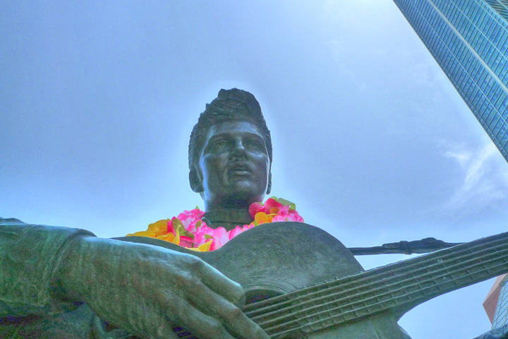 Elvis Presley：エルヴィス・プレスリー